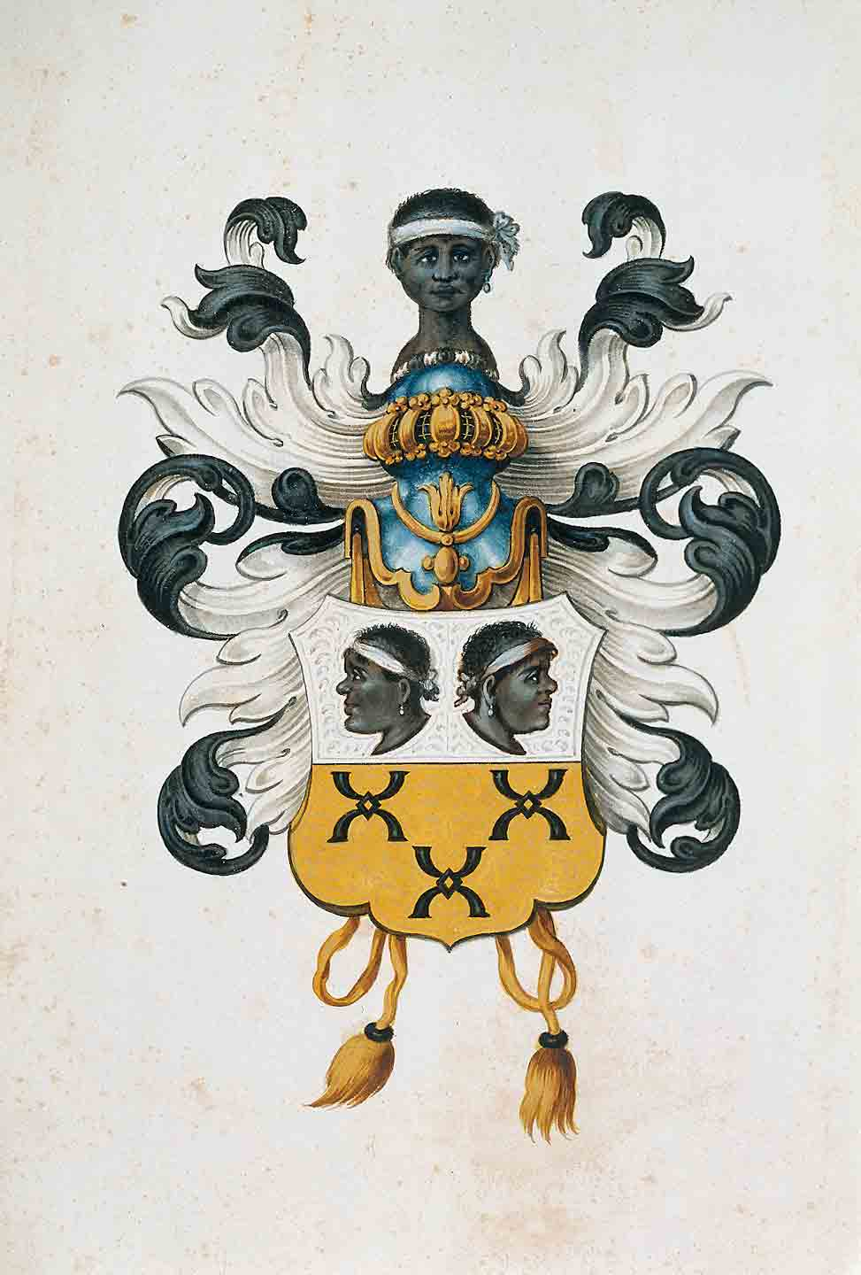 Van Loon, familiewapen